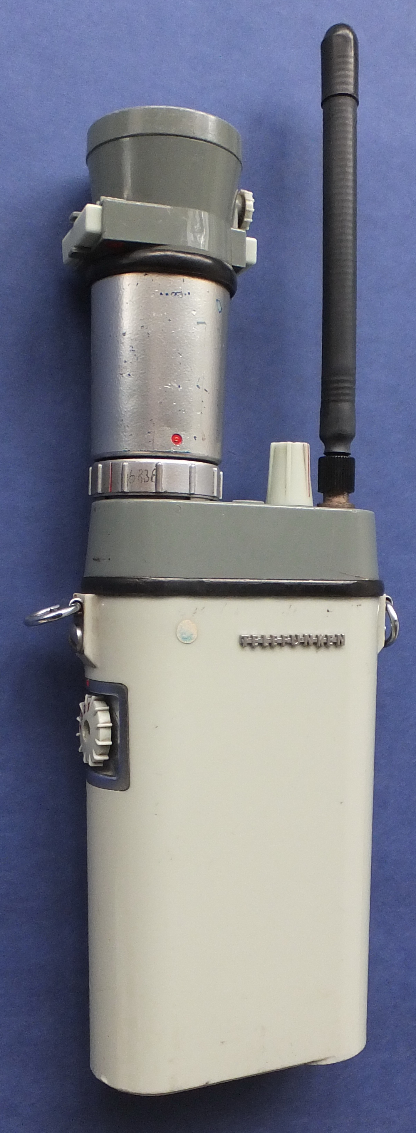 Teleport VI Handfunkgerät von Telefunken. Die Geräte wurden ab 1963 für den BOS-Funk von Behörden und Militär verwendet.